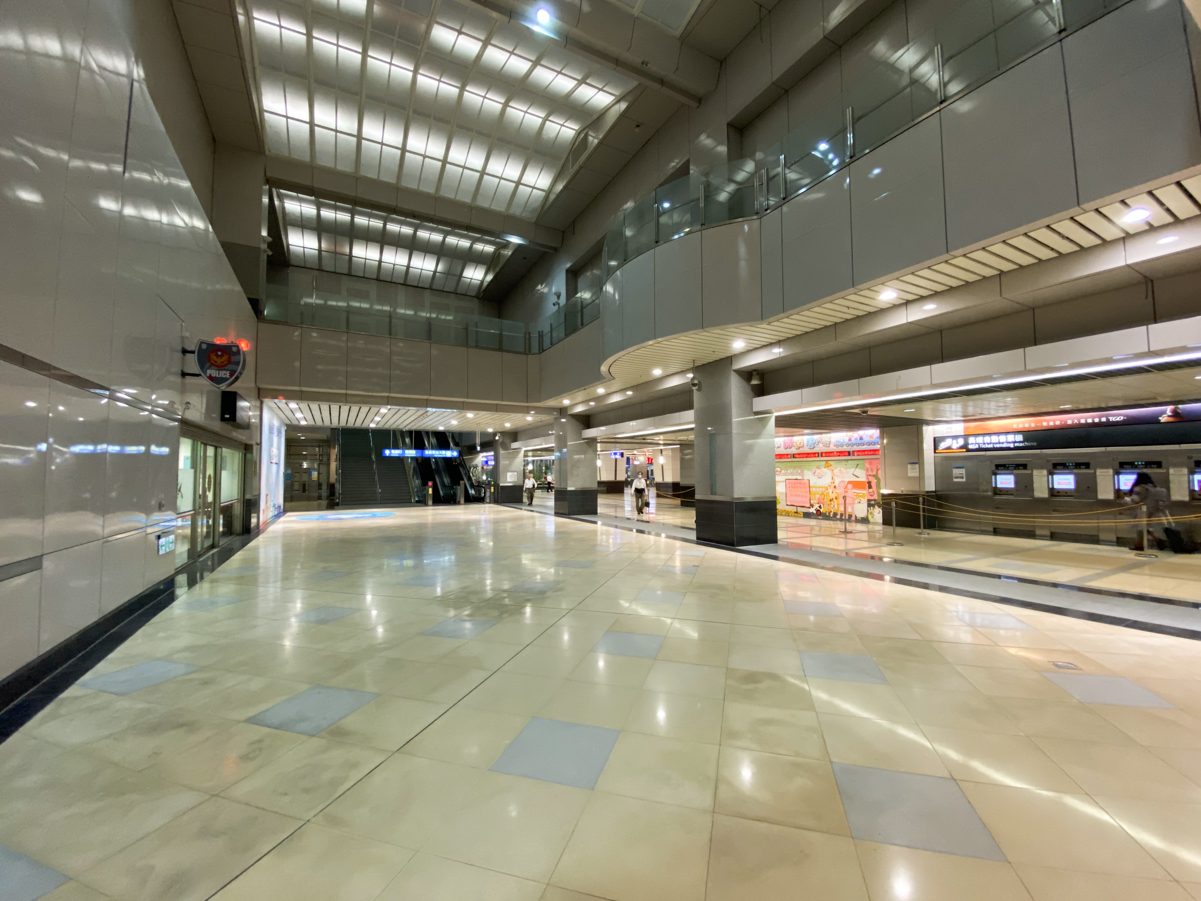 Nangang Station Basement View